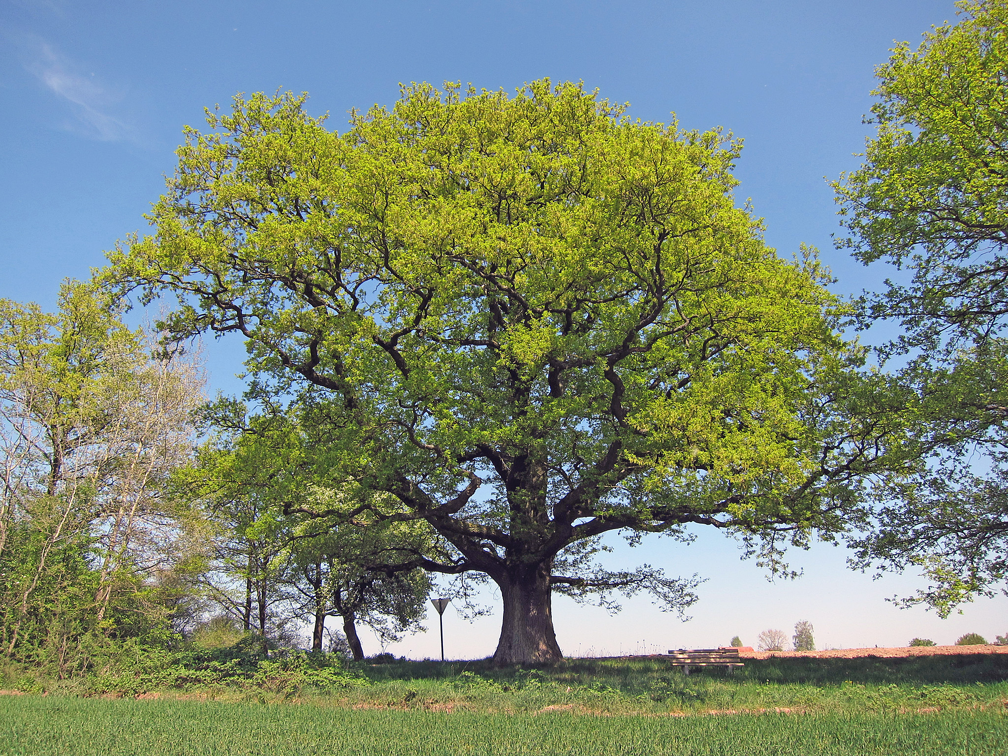 Eiche bei Dittlofsroda